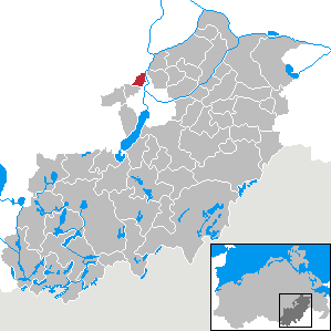 Woggersin in Mecklenburg-Vorpommern, Landkreis Mecklenburg-Strelitz